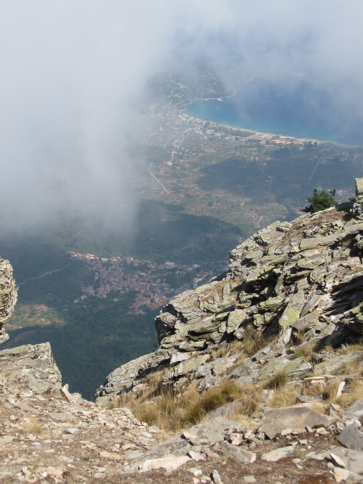 Potamia (2008) im Vordergrund